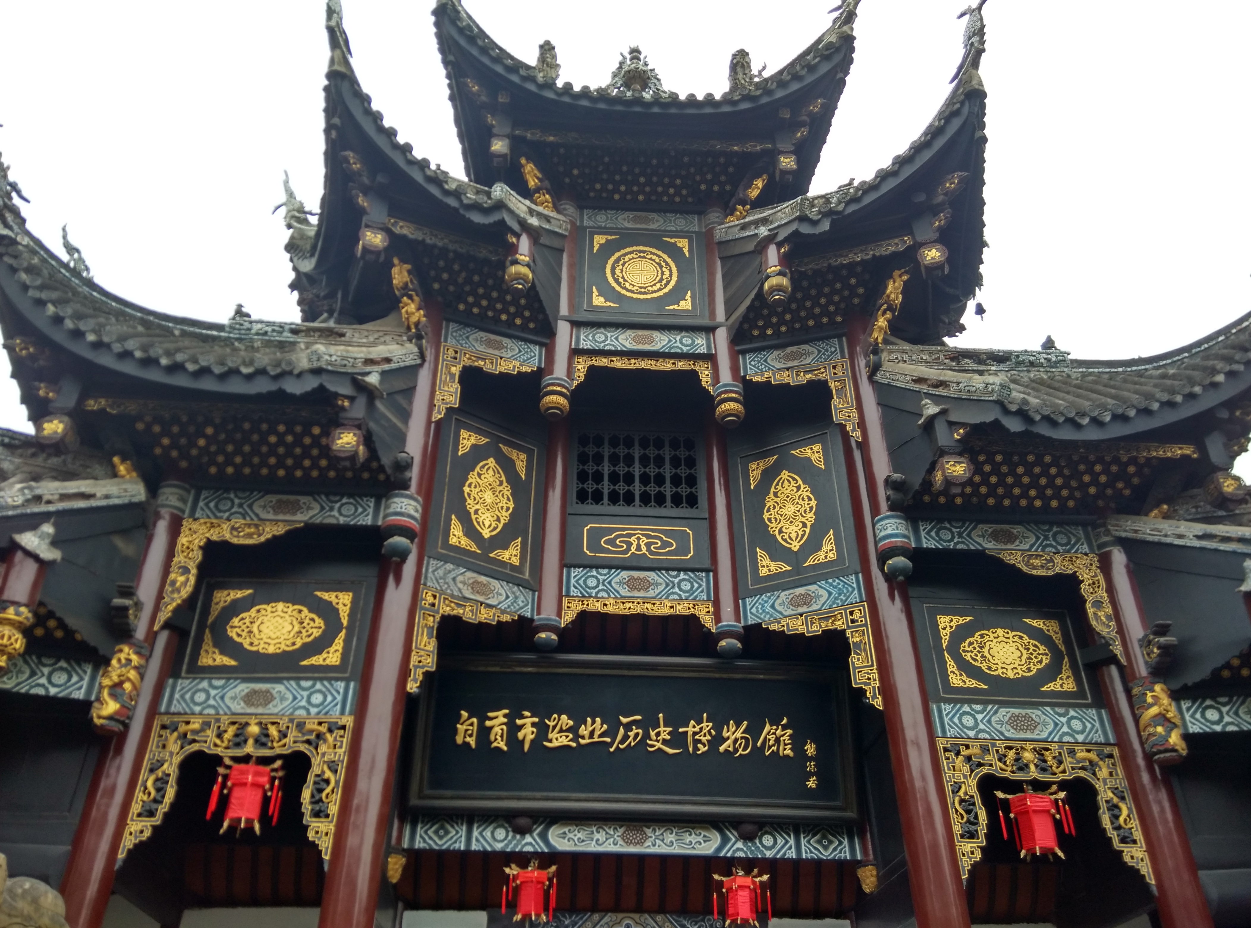 中文（中国大陆）: 西秦会馆武圣宫大门